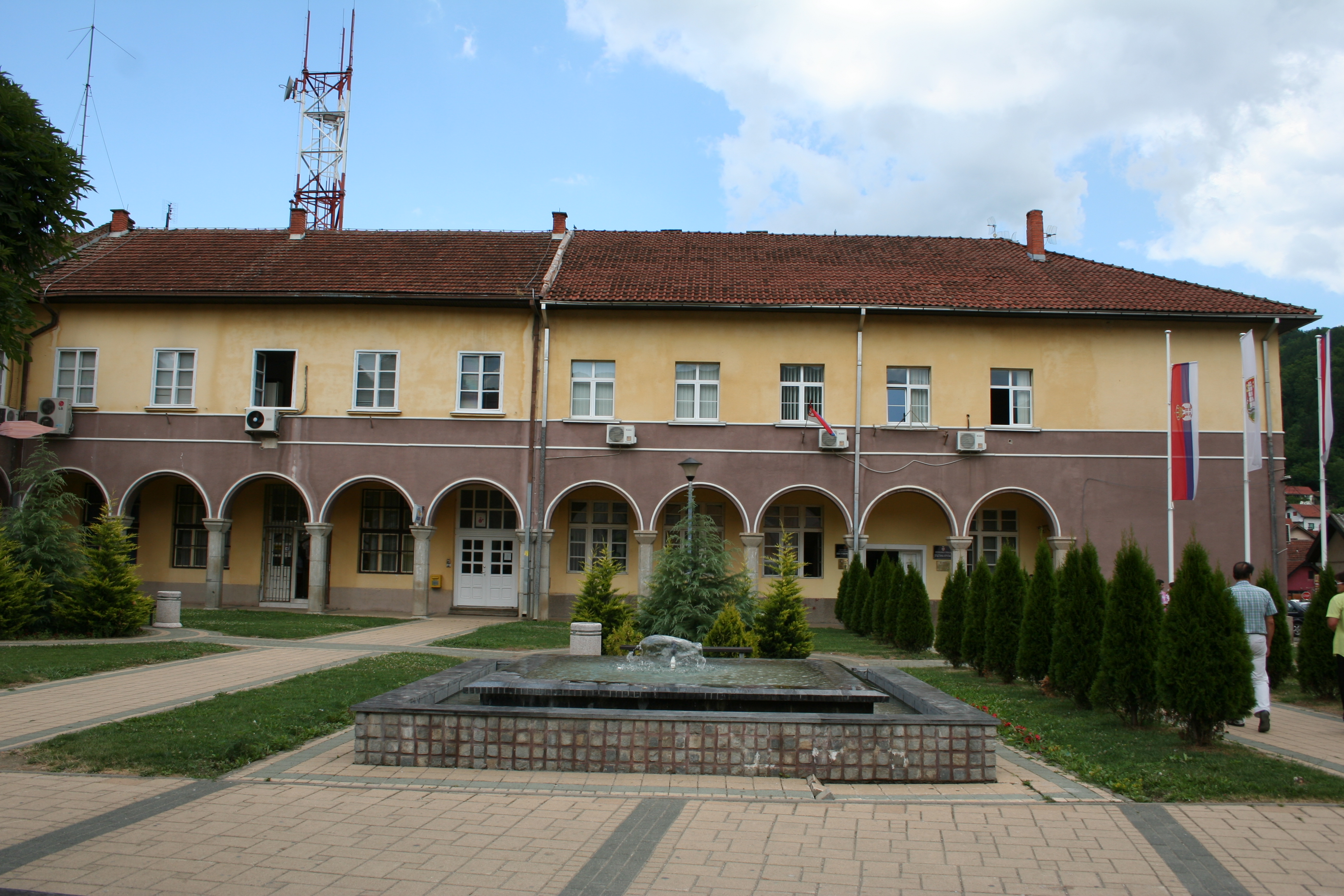 Zgrada SO Krupanj